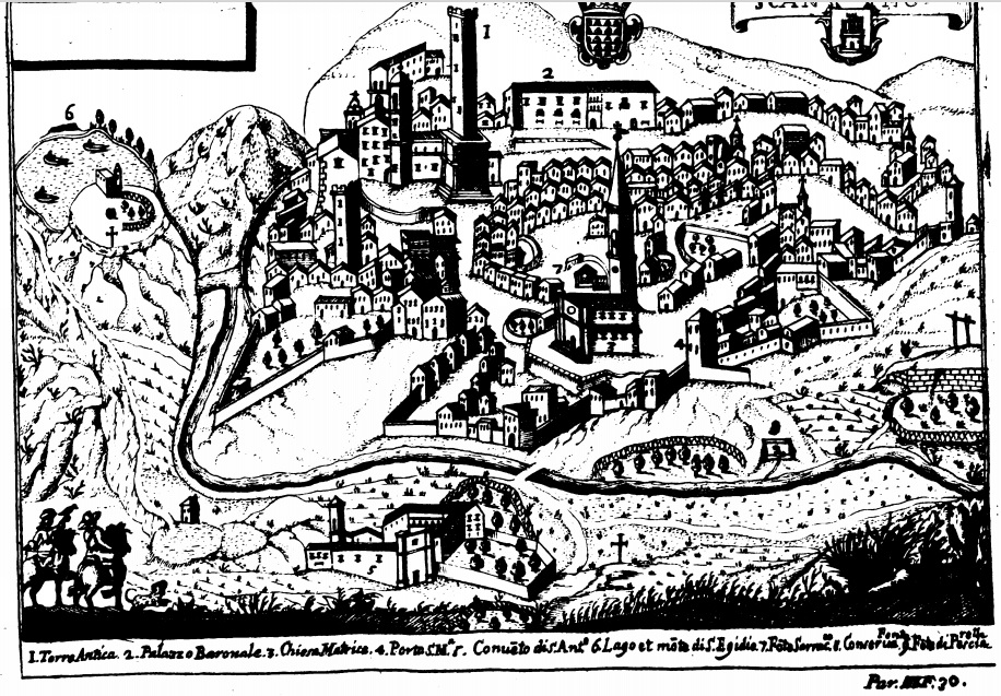 Disegno settecentesco di Scanno.